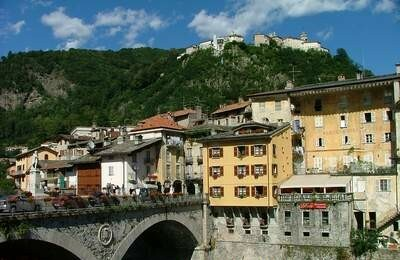 Varallo Sesia - Foto proprietà di Fotogian e rilasciata sotto GFDL